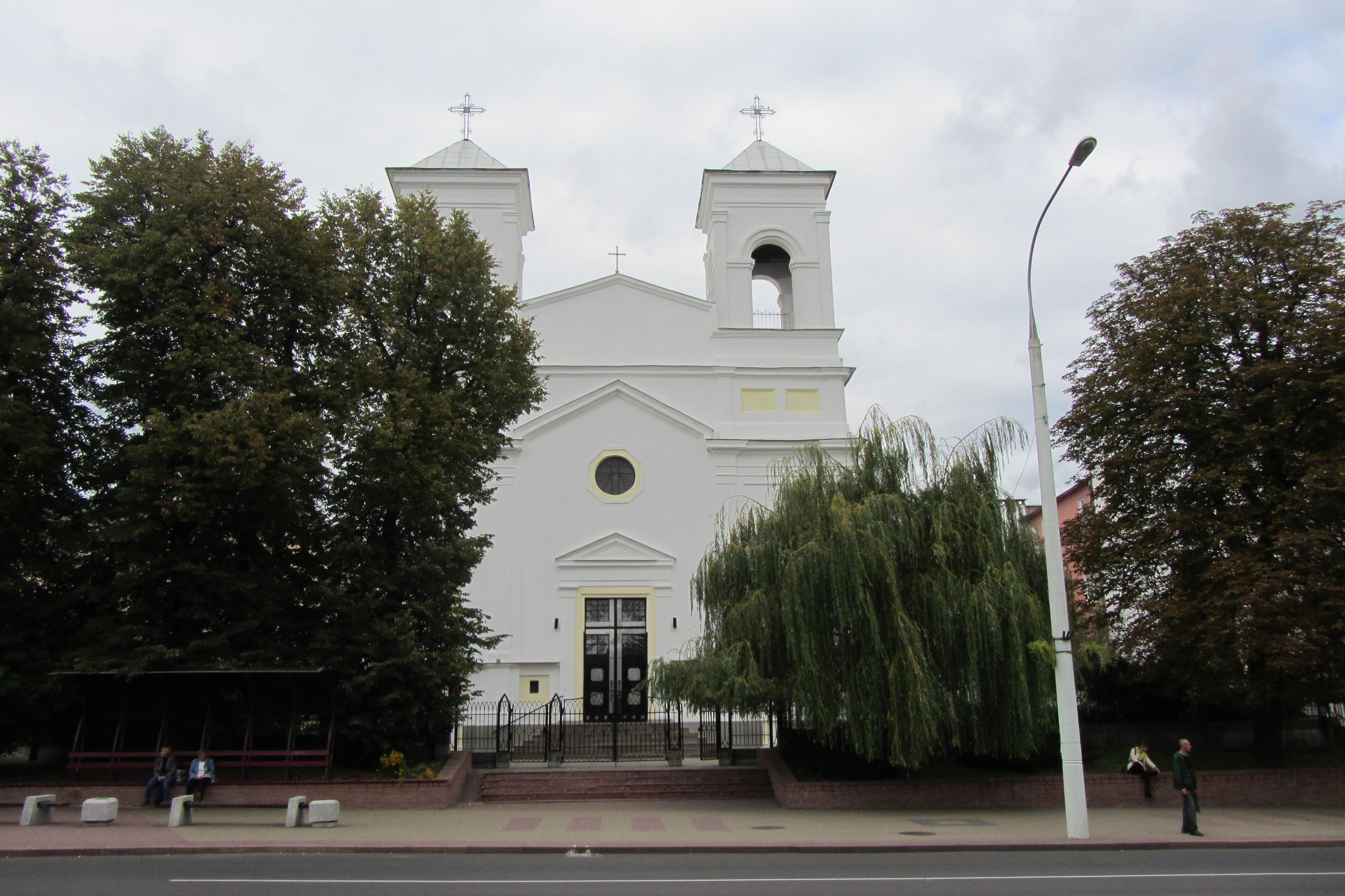 Беларуская (тарашкевіца): Катэдральны касьцёл Сьвятога Крыжа. г. Берасьце This is a photo of Belarusian heritage monument. Reference number: 113Г000015 ( WLM)